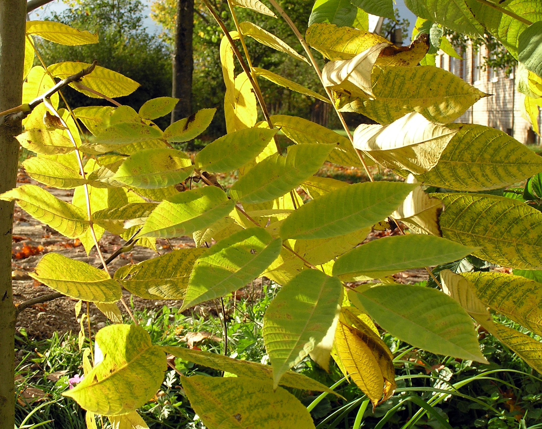 Mandzuuria pähklipuu liitleht sügisel